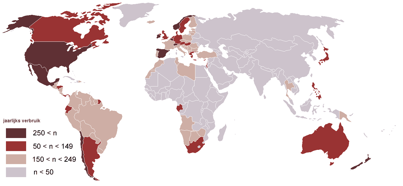 Mondiaal colaverbruik, in de wereld, originele bron: Franse Wikipedia (Image:Cocapassimondiale-1.png), gnu fdl, auteur Pixeltoo, vertaald door MADe onder de GFDL-licentie. De Kaart geeft volgens de franse wiki het aantal consumpties (fles, glas, etc) per hoofd van de bevolking per jaar aan, origineel geupload (8-7-2005). Geupload door Nijeholt